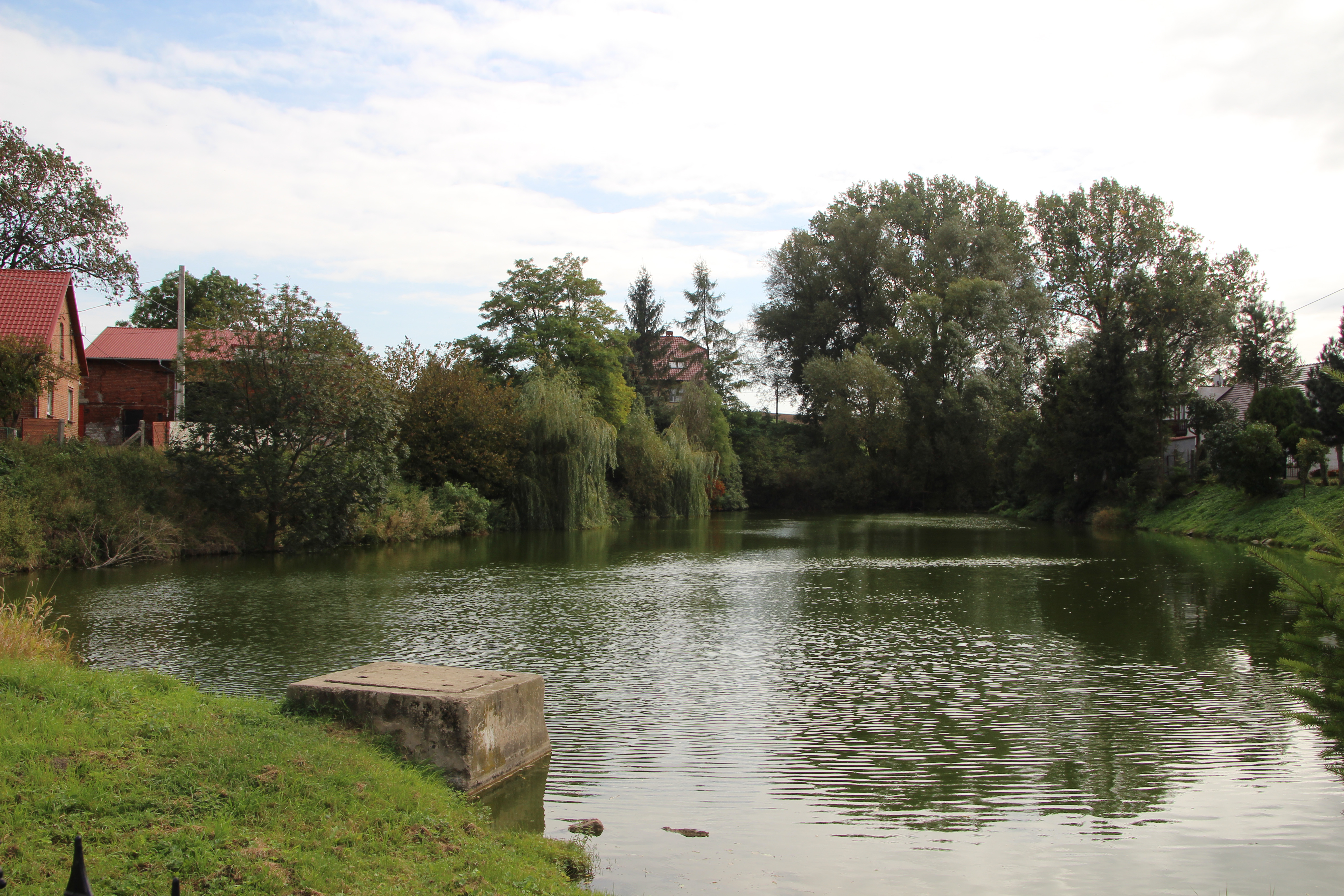 Ligota Mała (w j. niem. Klein Ellguth) – wieś w Polsce położona w województwie opolskim, w powiecie kędzierzyńsko-kozielskim, w gminie Polska Cerekiew.